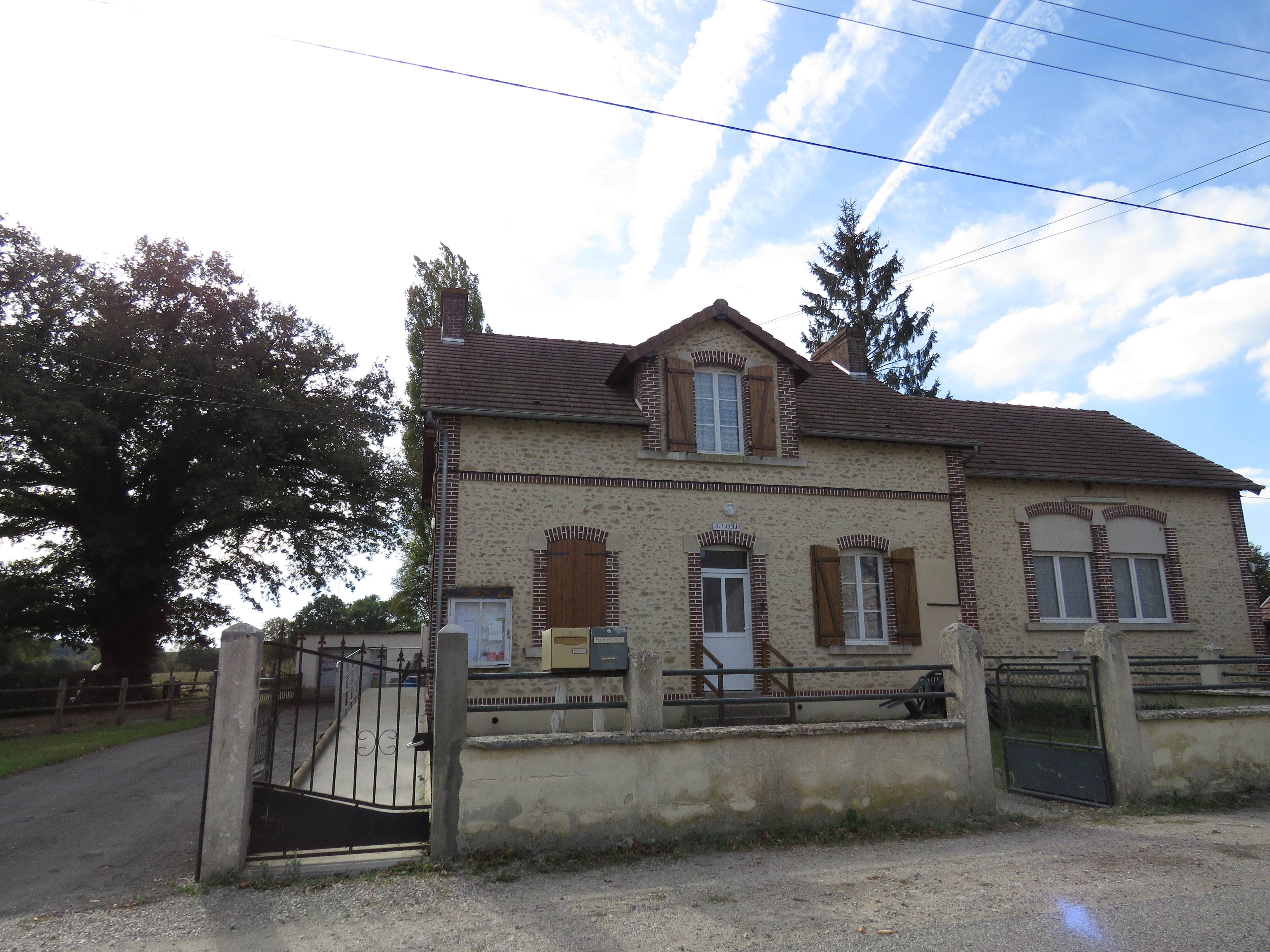 Mairie